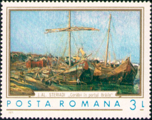 Jean Alexandru Steriadi - Corabii in portul Braila